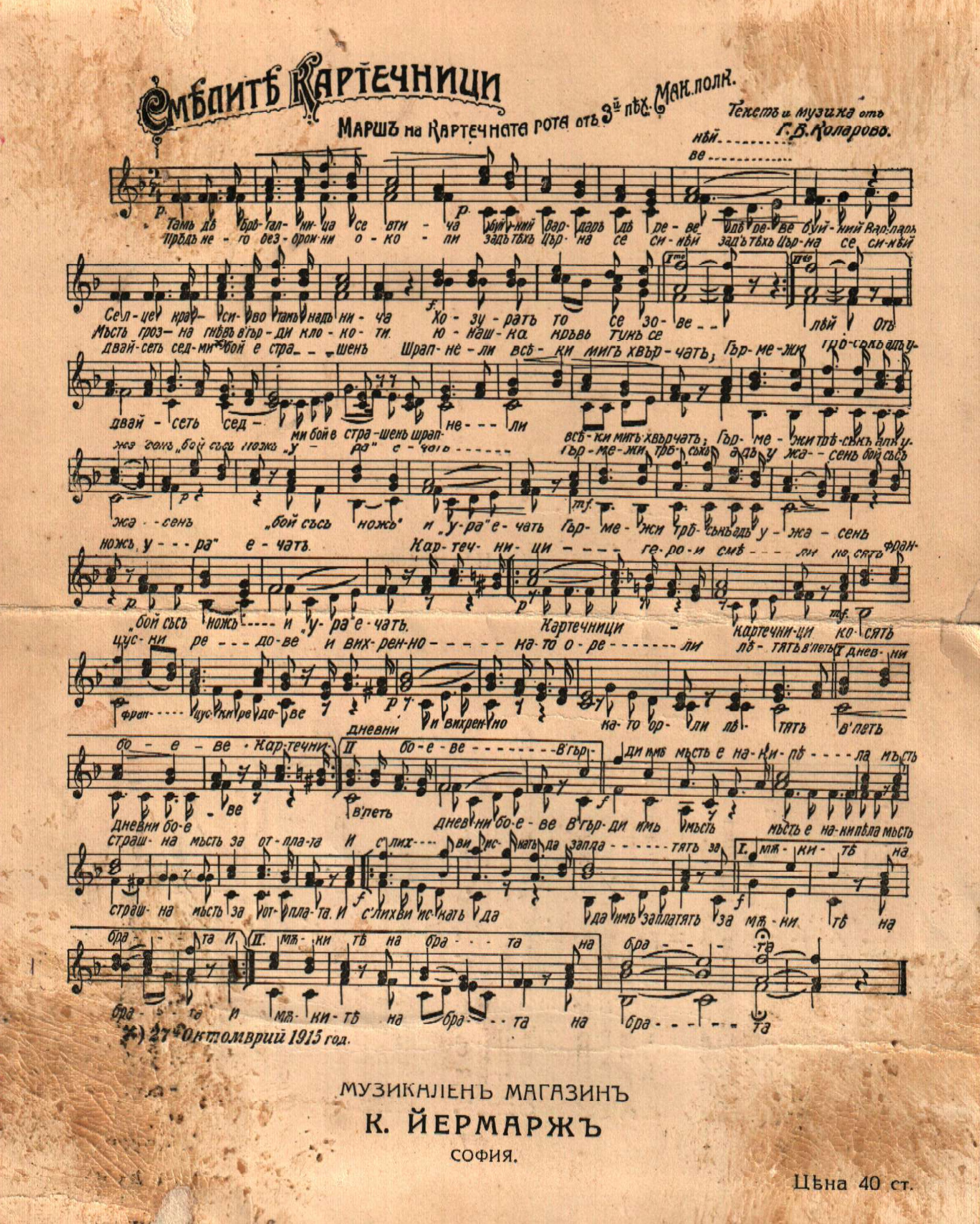 „Смелите картечници“, походен марш на картечната рота от 3-и Пехотен Македонски полк